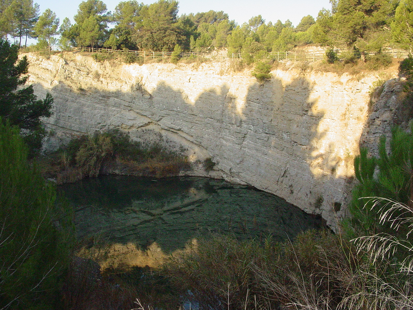 Pèlags de Vilobí del Penedès